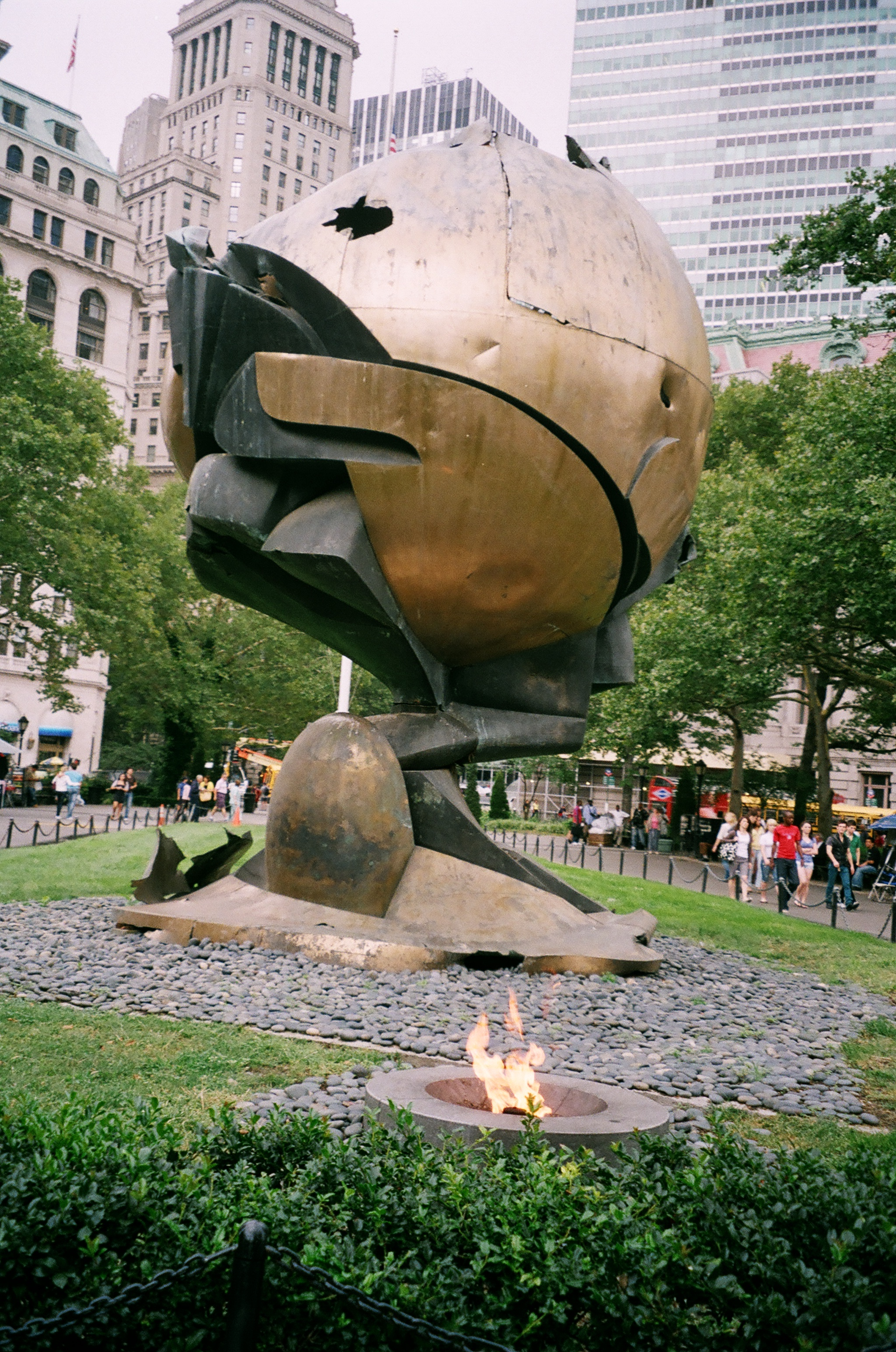 L'esfera de la Plaça del Trade center desprès de l'atemptat.